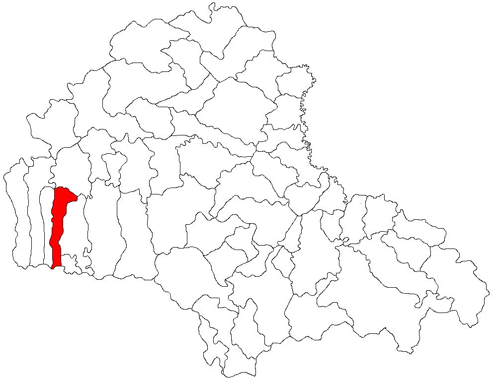 Categorie:Hărţi ale judeţului Braşov